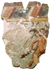 Hércules con la clava y jabalí de Erimanto en una pintura mural de la Colonia Celsa (Zaragoza)